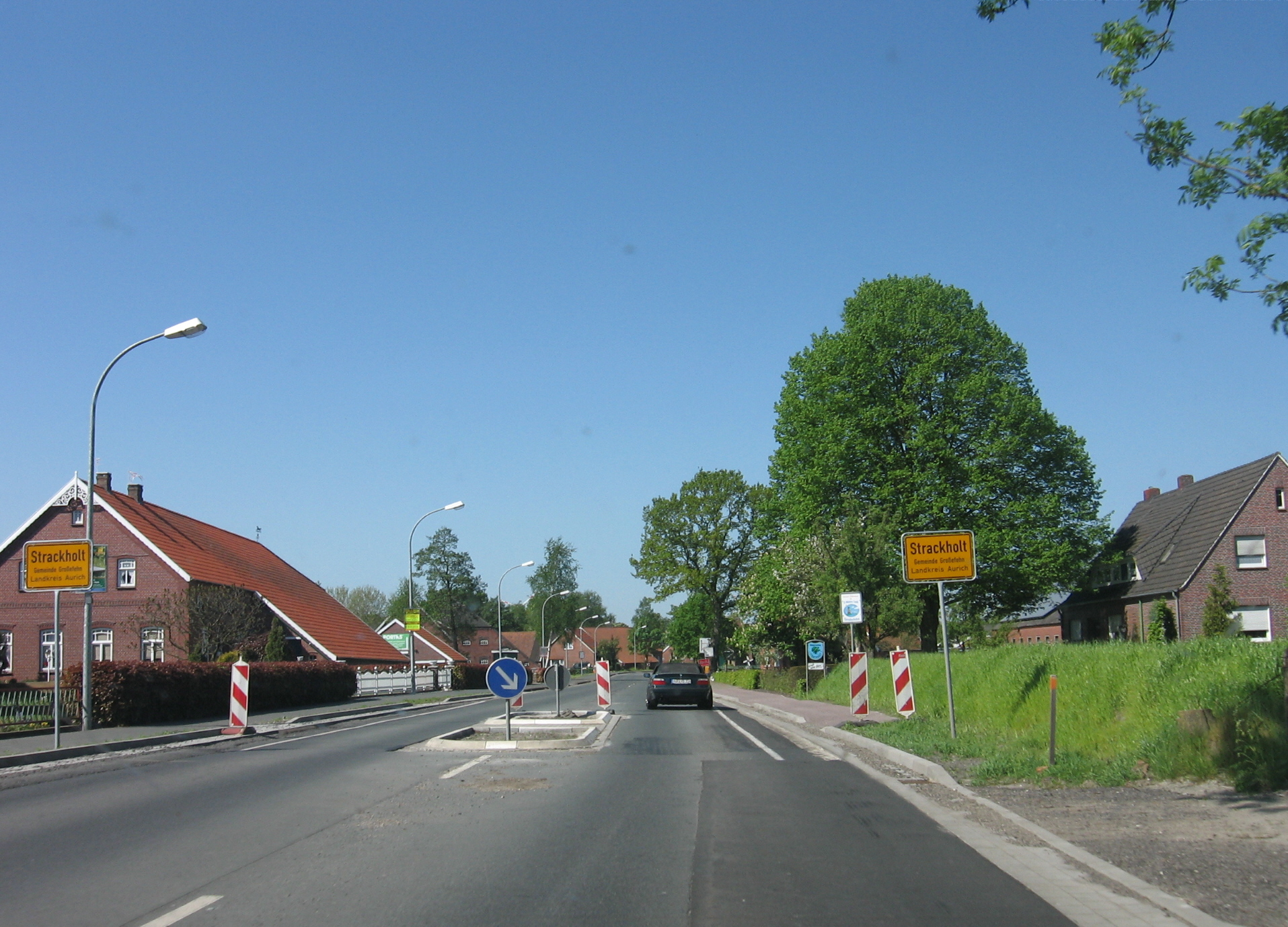 Strackholt